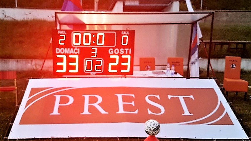 Završni rezultat finala Vilbalskog Vidovdanskog kupa održanog 2018.godine u Vladičinom Hanu u Srbiji.